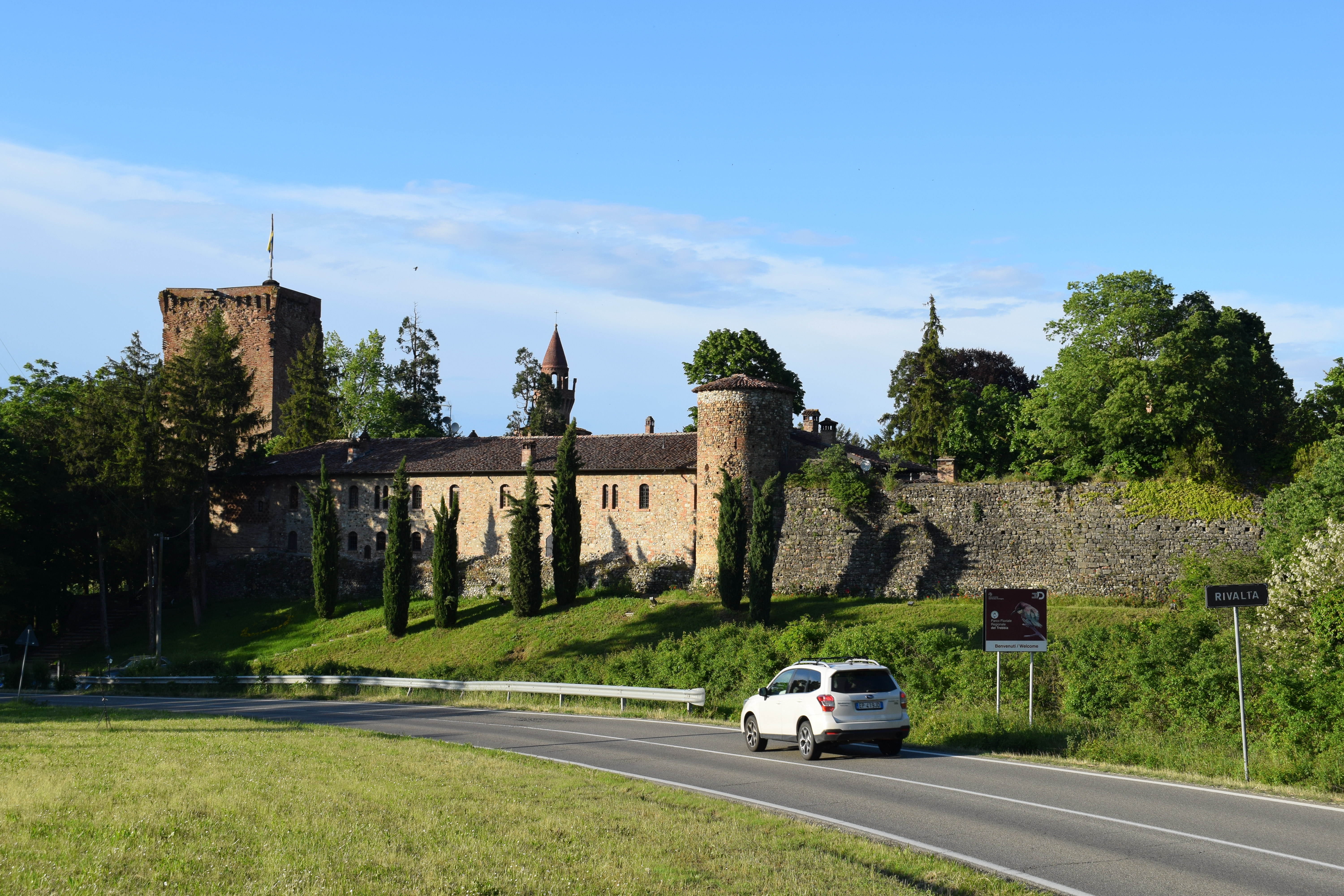 Château de Rivalta, Rivalta Trebbia, Italie